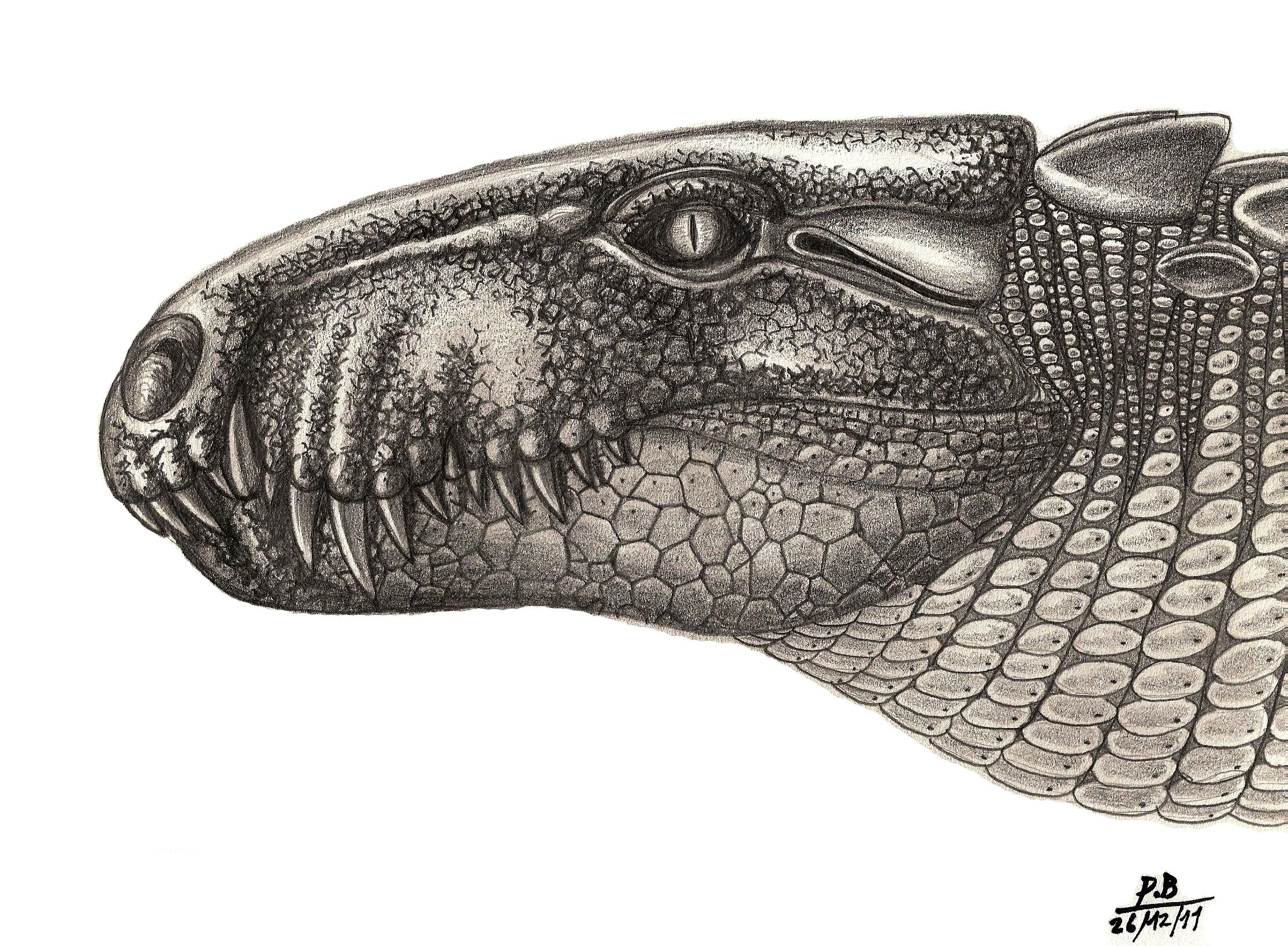 Representación en vida del rostro del bretesuquido Bretesuchus bonapartei, un crocodyliforme carnívoro terrestre del Paleoceno tardío del Noroeste de Argentina.